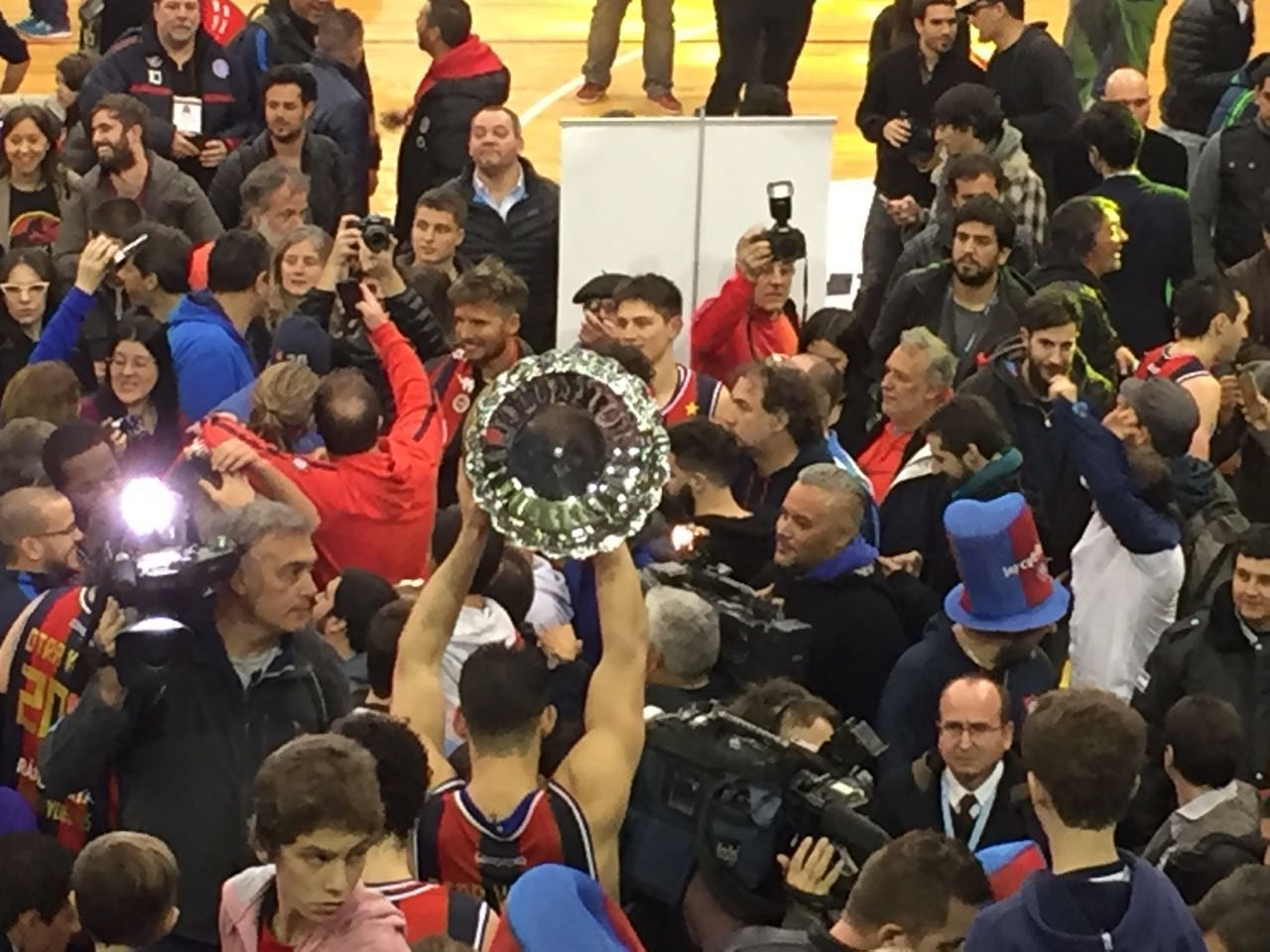 San Lorenzo campeón de la Liga Nacional de Básquet